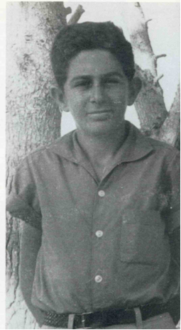 Le jeune vénérable Faustino Pérez-Manglano Magro.